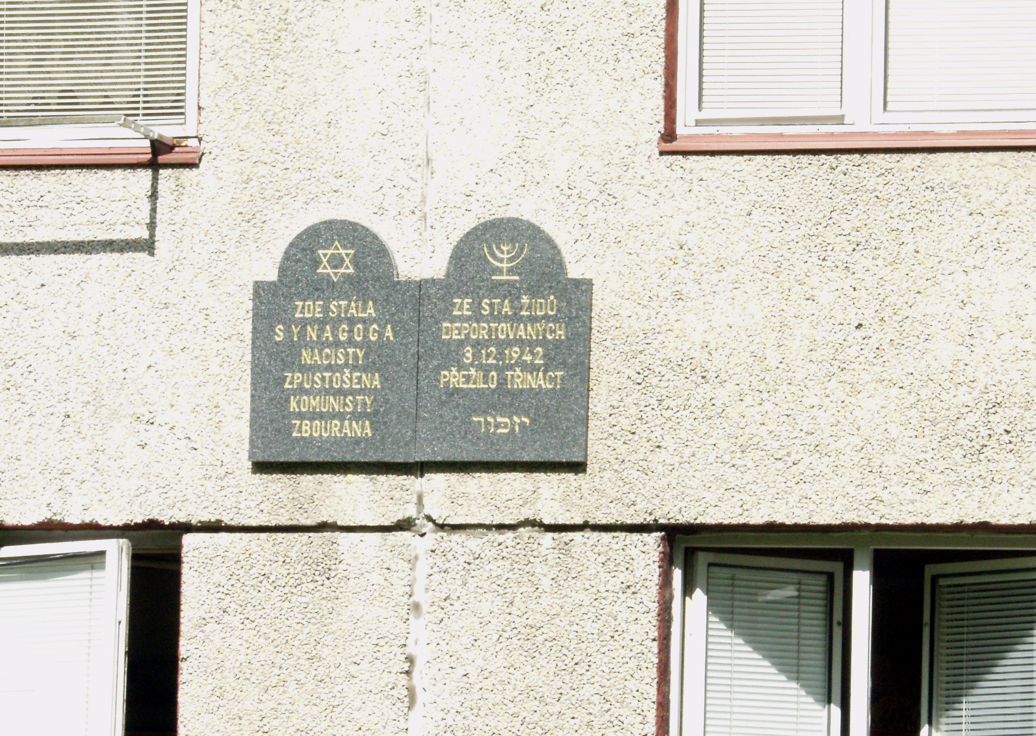 Litomyšl: Pamětní deska na místě bývalé synagogy